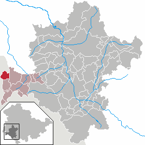 Unterweid in Thuringia - District Schmalkalden-Meiningen